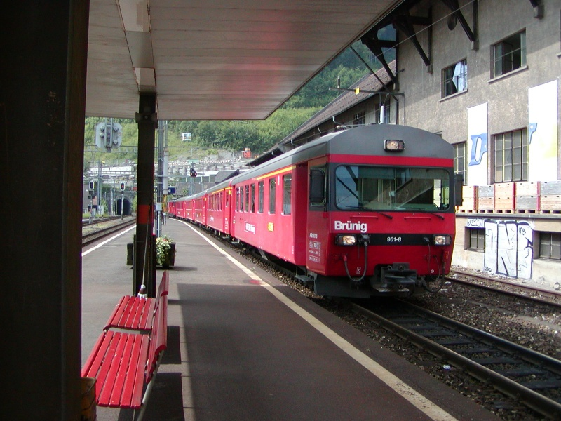 SBB Hergiswil